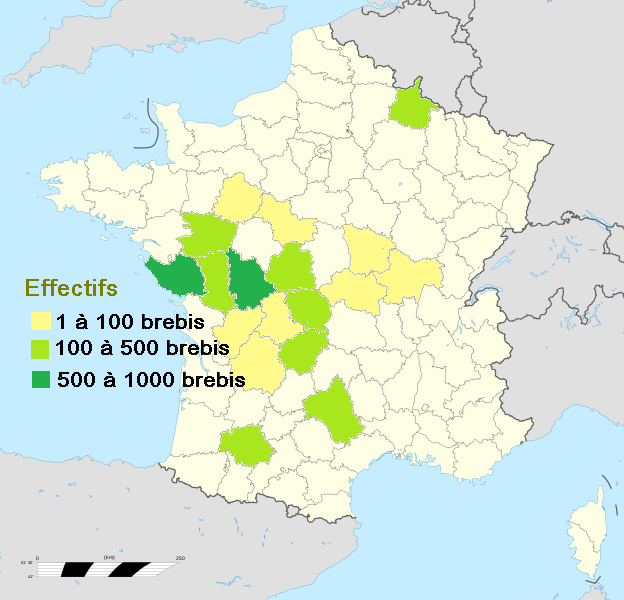 Implantation des élevages de sélection de la race ovine de la Charmoise, en nombre de brebis soumises au contrôle des performances en 2009 (sources : Institut de l'Élevage, France)